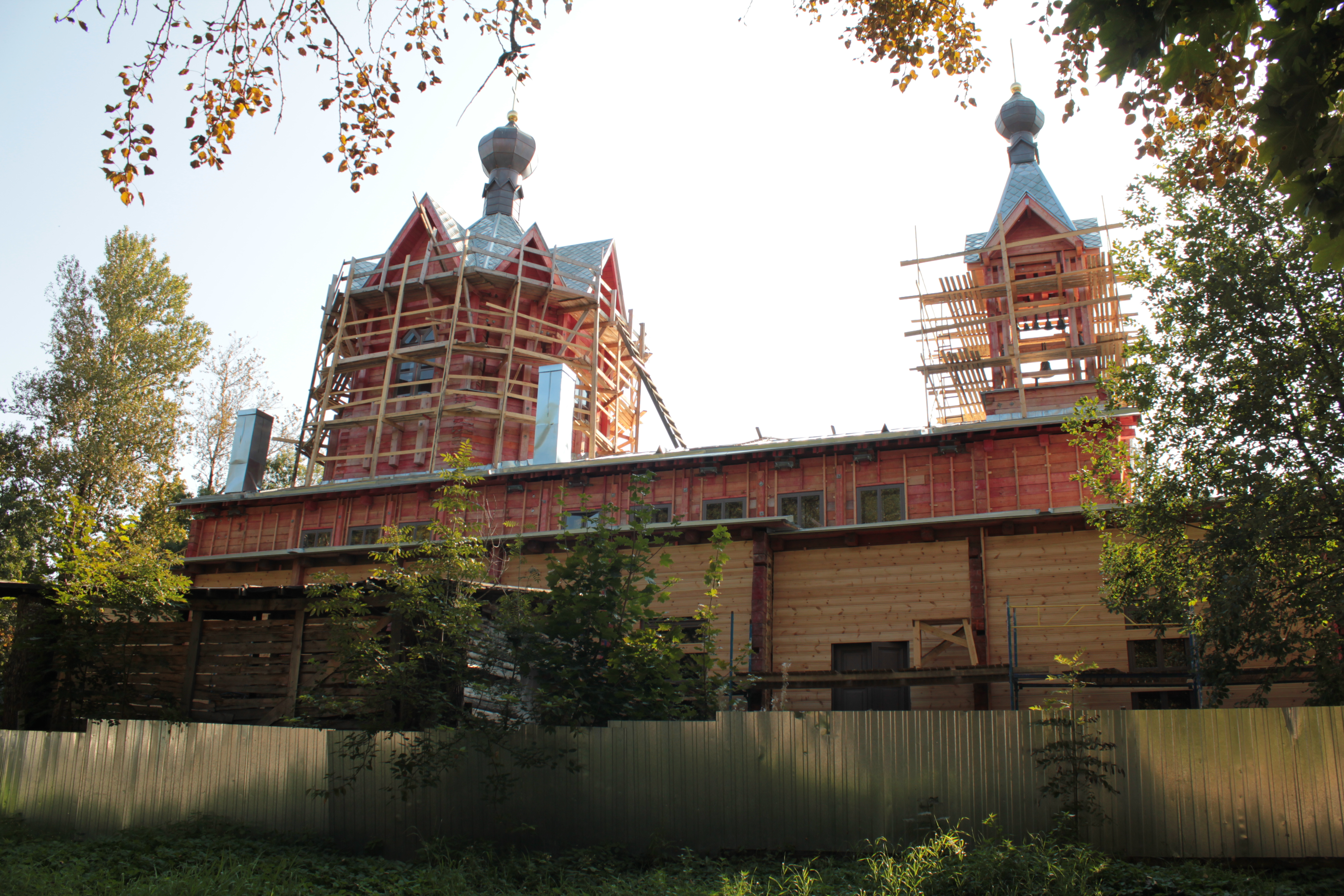 Церковь Святого Спиридония Тримифунтского (Санкт-Петербург и Лен.область, Ломоносов, Иликовский проспект, 1)